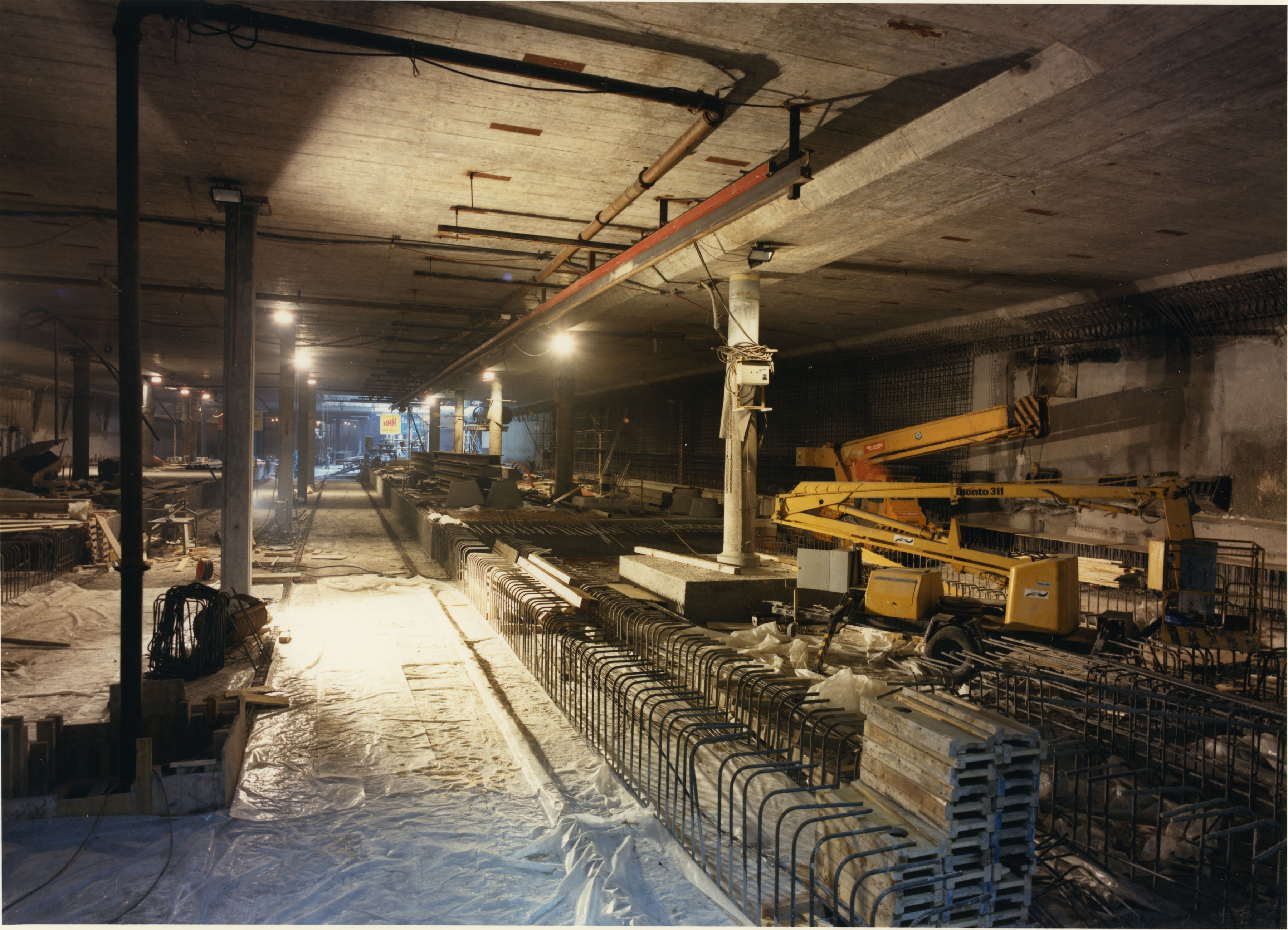 Zürich Hauptbahnhof, Baustelle im S-Bahnhof Museumstrasse (Tag der offenen Tür 1987)